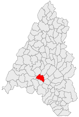 Categorie:Hărţi ale judeţului Bihor